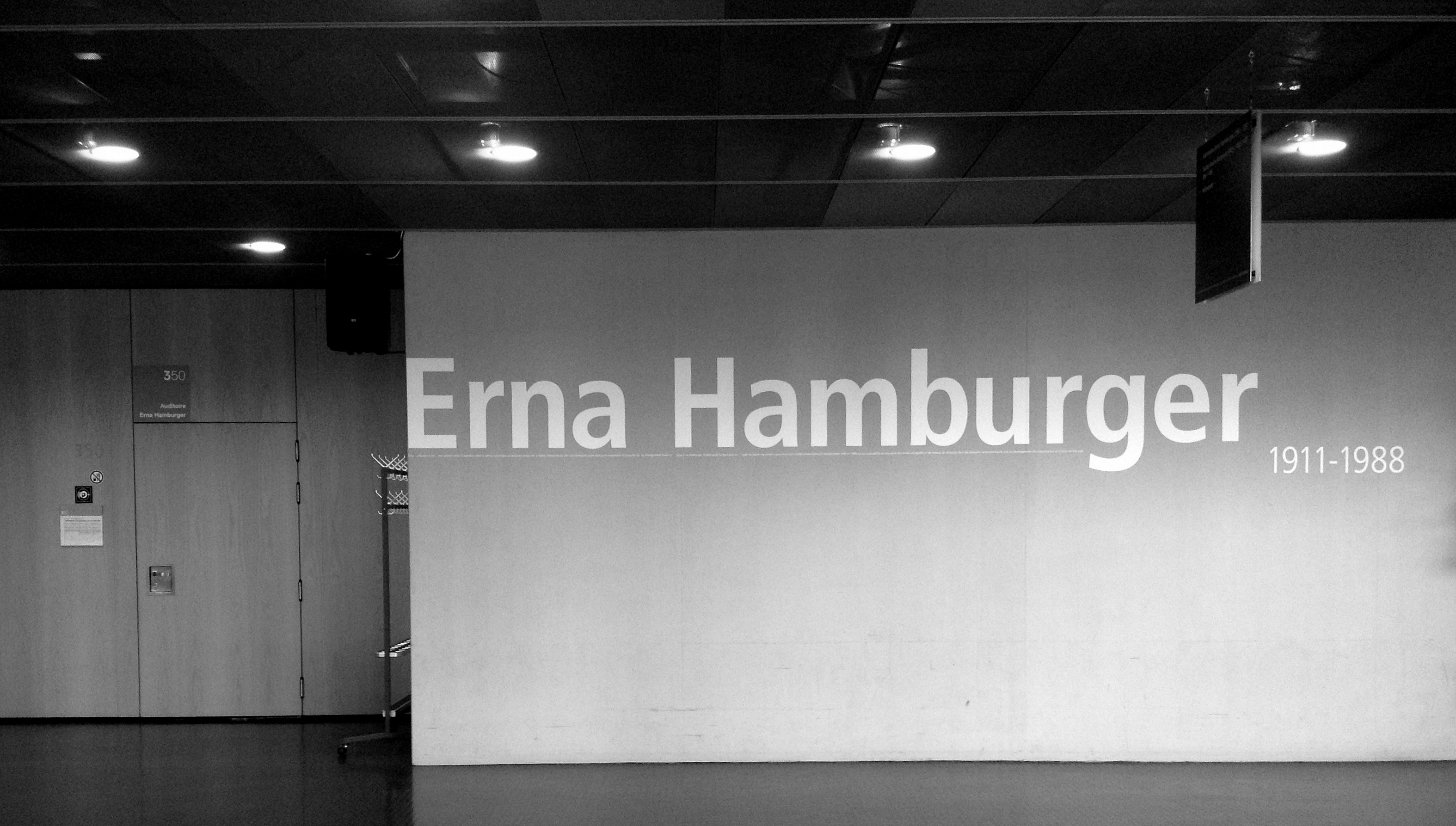 Auditoire Erna Hamburger à l'Amphimax, Unil, Dorigny-Lausanne